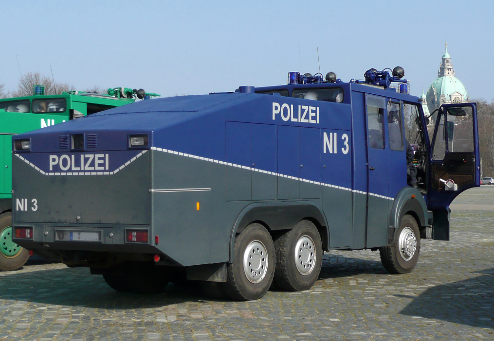 Wasserwerfer 9000 der Polizei Niedersachsen auf dem Schützenplatz Hannover